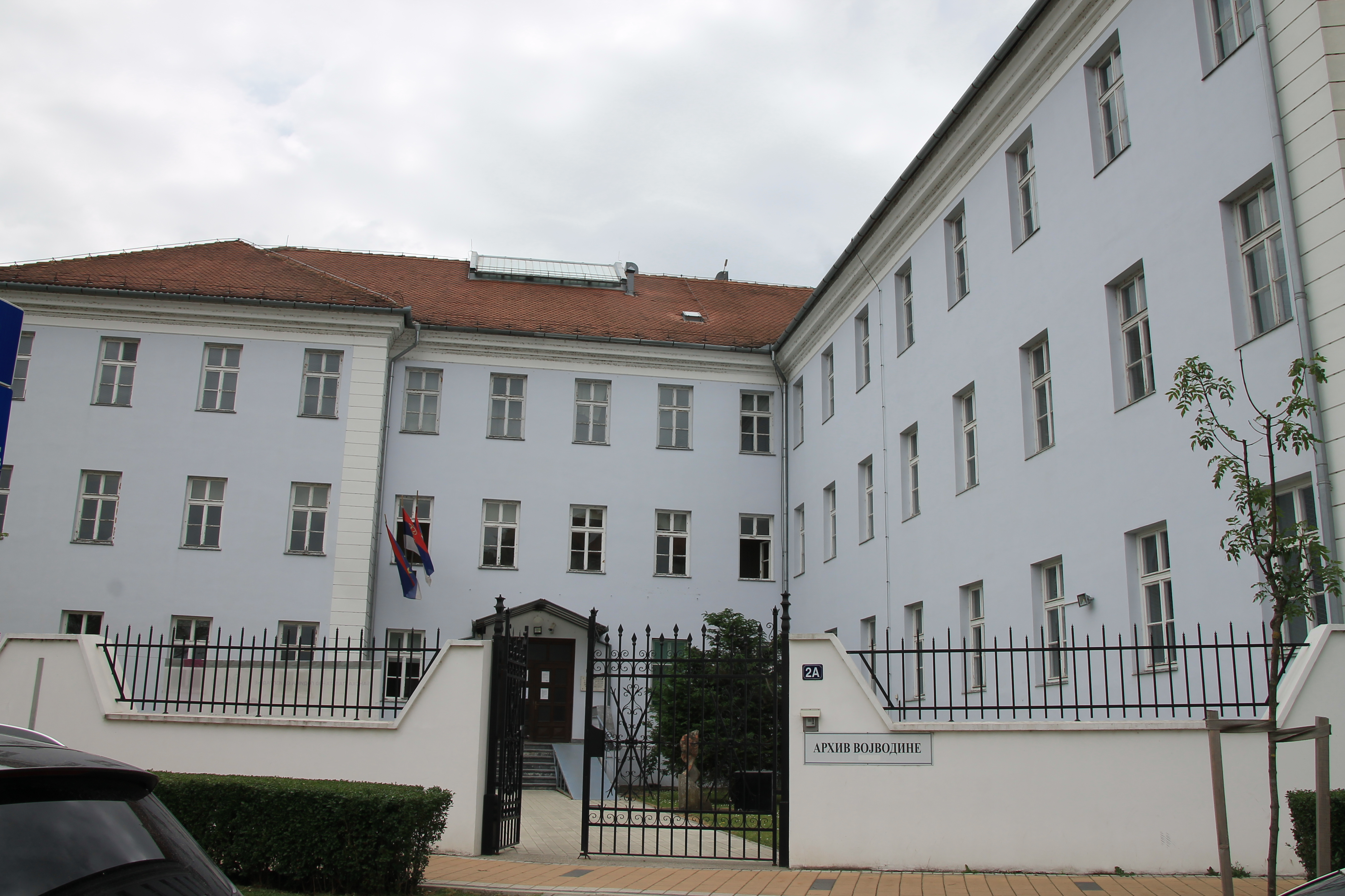 Zgrada Arhiva Vojvodine